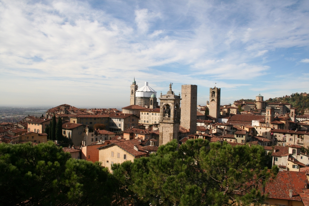 Autore Giorces.Bergamo alta dalla Rocca.